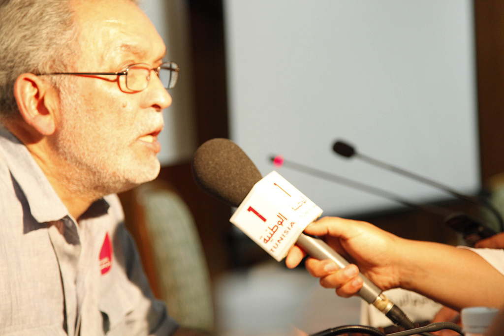 Kamel Jendoubi président de l'Instance supérieure indépendante pour les élections (Isie) - Tunisie, lors d'une conférence de presse le 12 juillet 2011